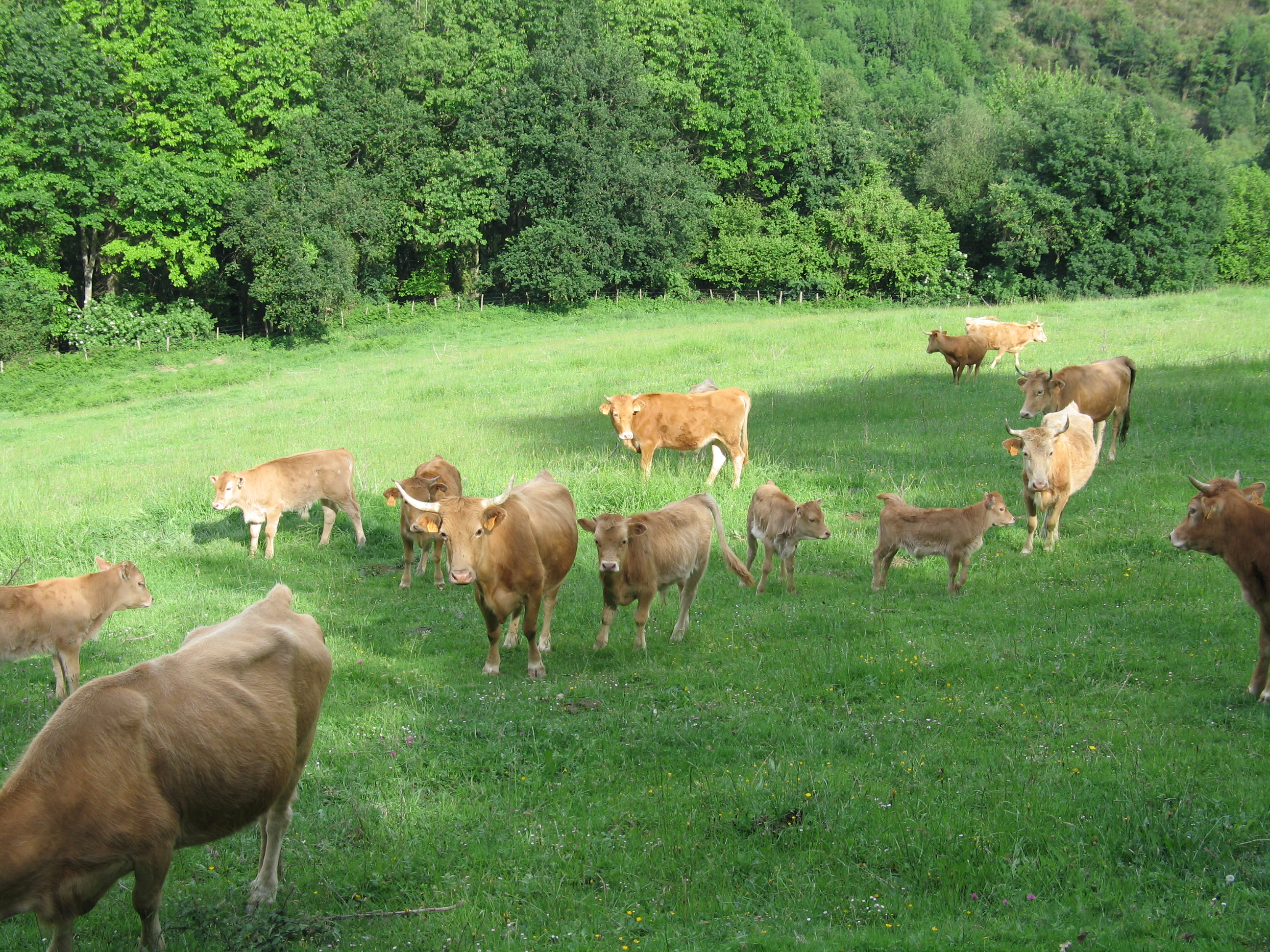 Zenbait betizu zelaian